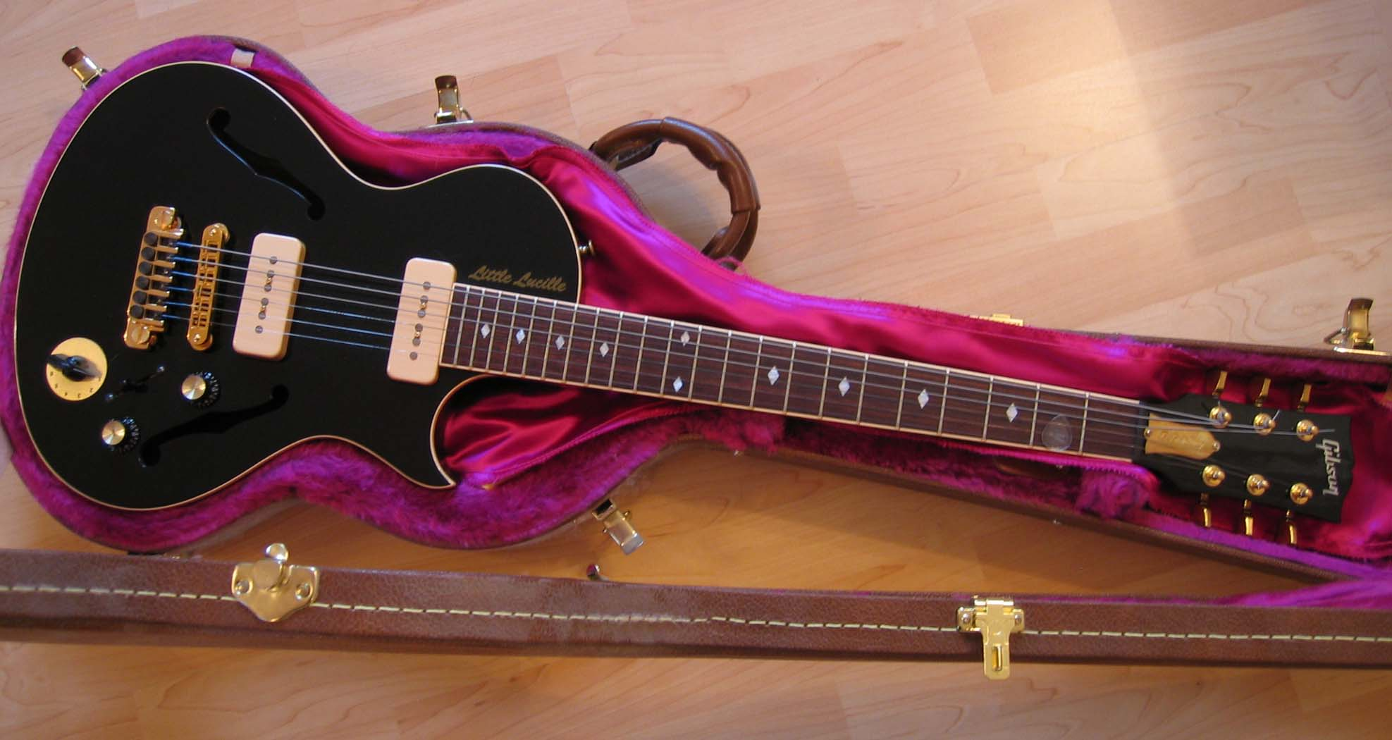 Die Gibson "Little Lucille" ist eine E-Gitarre, die von der US-amerikanischen Firma Gibson hergestellt wurde. Die mit zwei klassischen F-Löchern und zwei Blues P90 Single Coils mit Dummy-Spule ausgestattete "Little Lucille" ist eine Variante der Gibson Blueshawk: Die Saiten werden nicht mehr durch den Gitarrenkorpus geführt, stattdessen wird die Gibson Tune-o-matic-Brücke mit TP6-Saitenhalter und Feinstimmern verwendet.